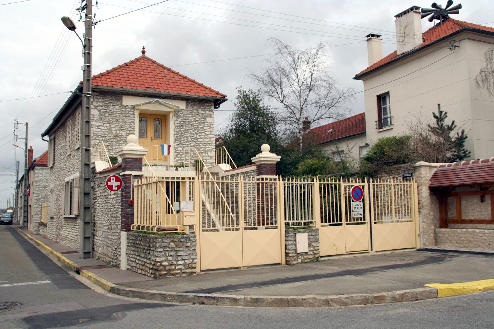 Mairie de Guernes - Yvelines (France)